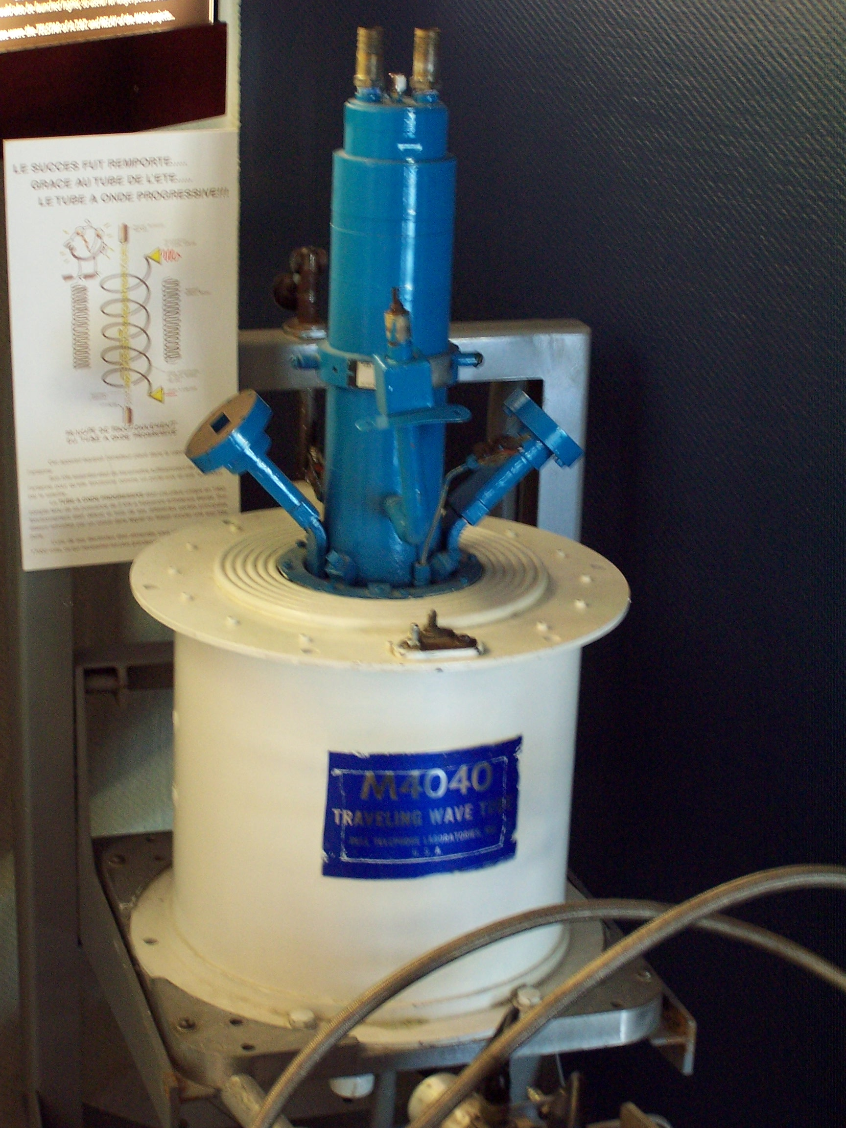 Tube à onde progressive utilisé sur l'antenne PB1 (Radôme) Pleumeur-Bodou